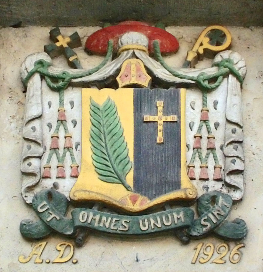 Wappen über dem Eingang zur St.-Joseph-Kirche in Schöppenstedt